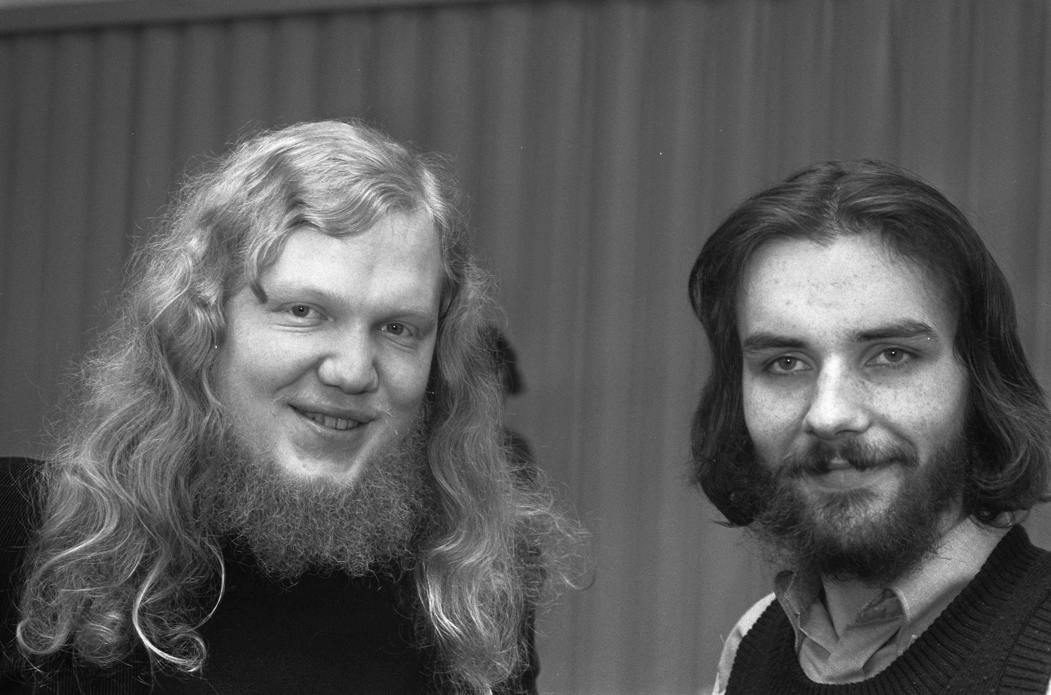 Collectie / Archief : Fotocollectie Anefo Reportage / Serie : [ onbekend ] Beschrijving : Nationaal Damkampioenschap, Sybrands en Wiersma (koppen) Datum : 20 april 1973 Trefwoorden : dammen, portretten Fotograaf : Punt, […] / Anefo Auteursrechthebbende : Nationaal Archief Materiaalsoort : Negatief (zwart/wit) Nummer archiefinventaris : bekijk toegang 2.24.01.05 Bestanddeelnummer : 926-3614